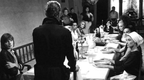 Screenshot del film 8½ (1963)